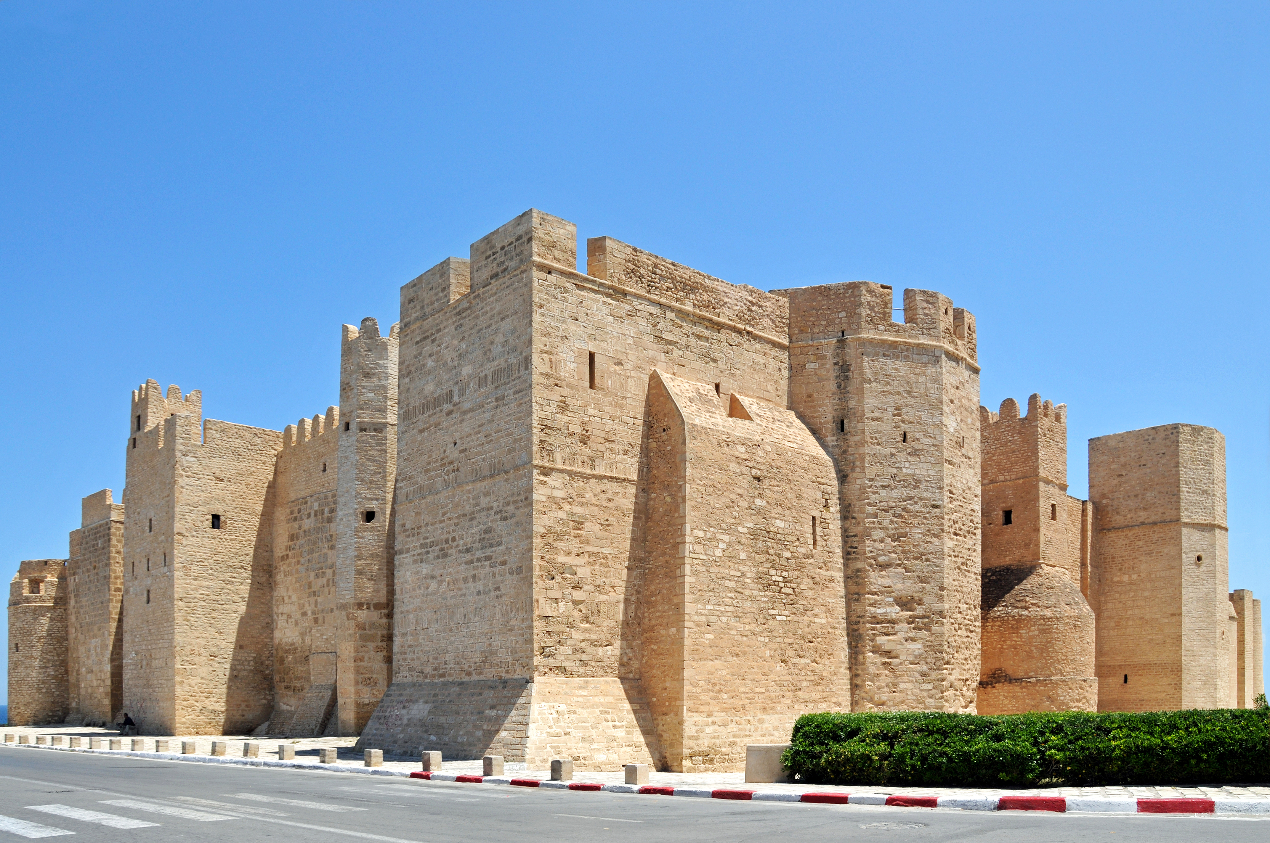 Vue des murs crénelés et des tours du ribat de Monastir. Ce ribat est une imposante forteresse située dans la ville côtière de Monastir en Tunisie.